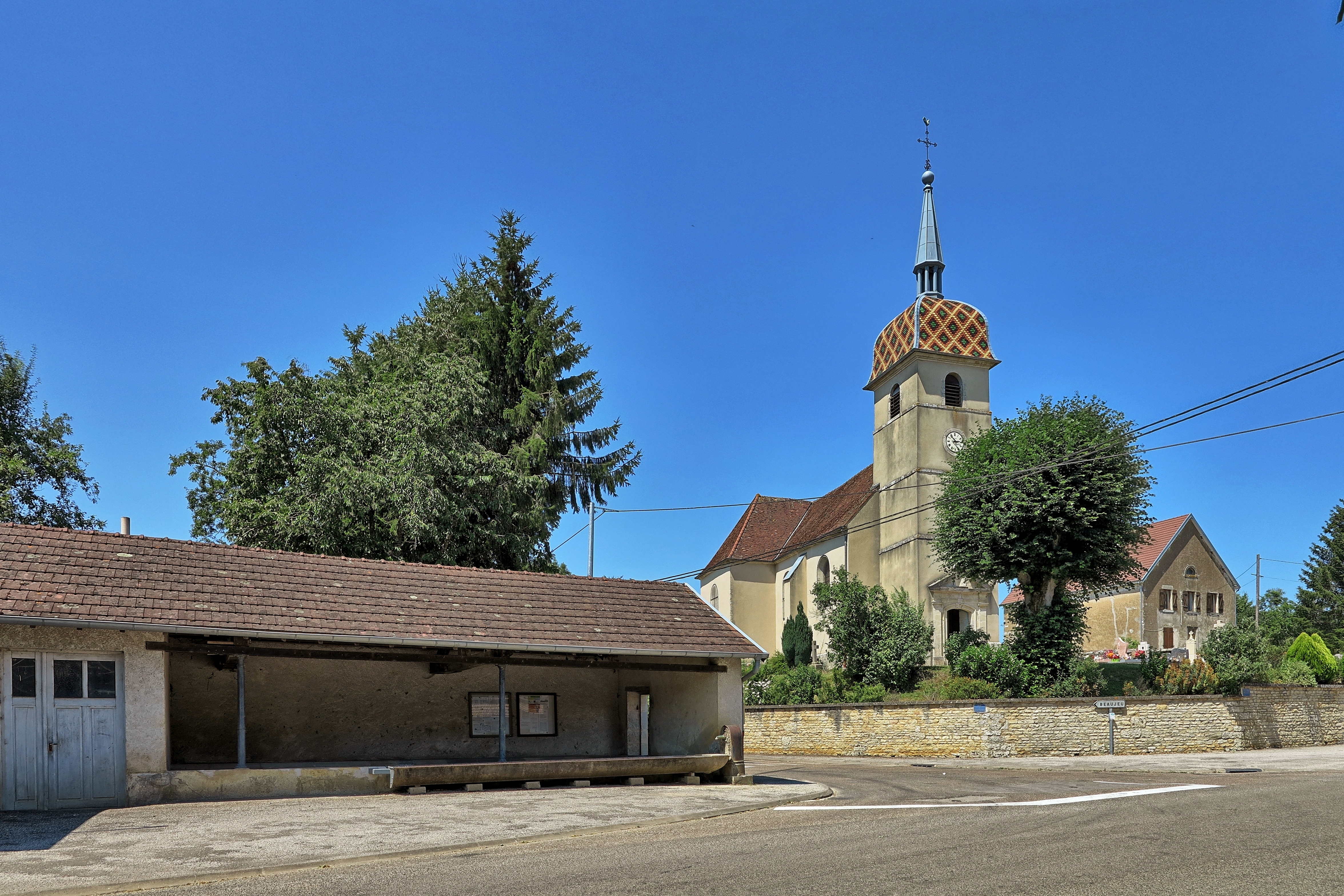 Le lavoir et l'église